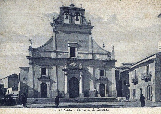 Chiesa di San Giuseppe (città di San Cataldo, provincia Caltanissetta) (2).jpg